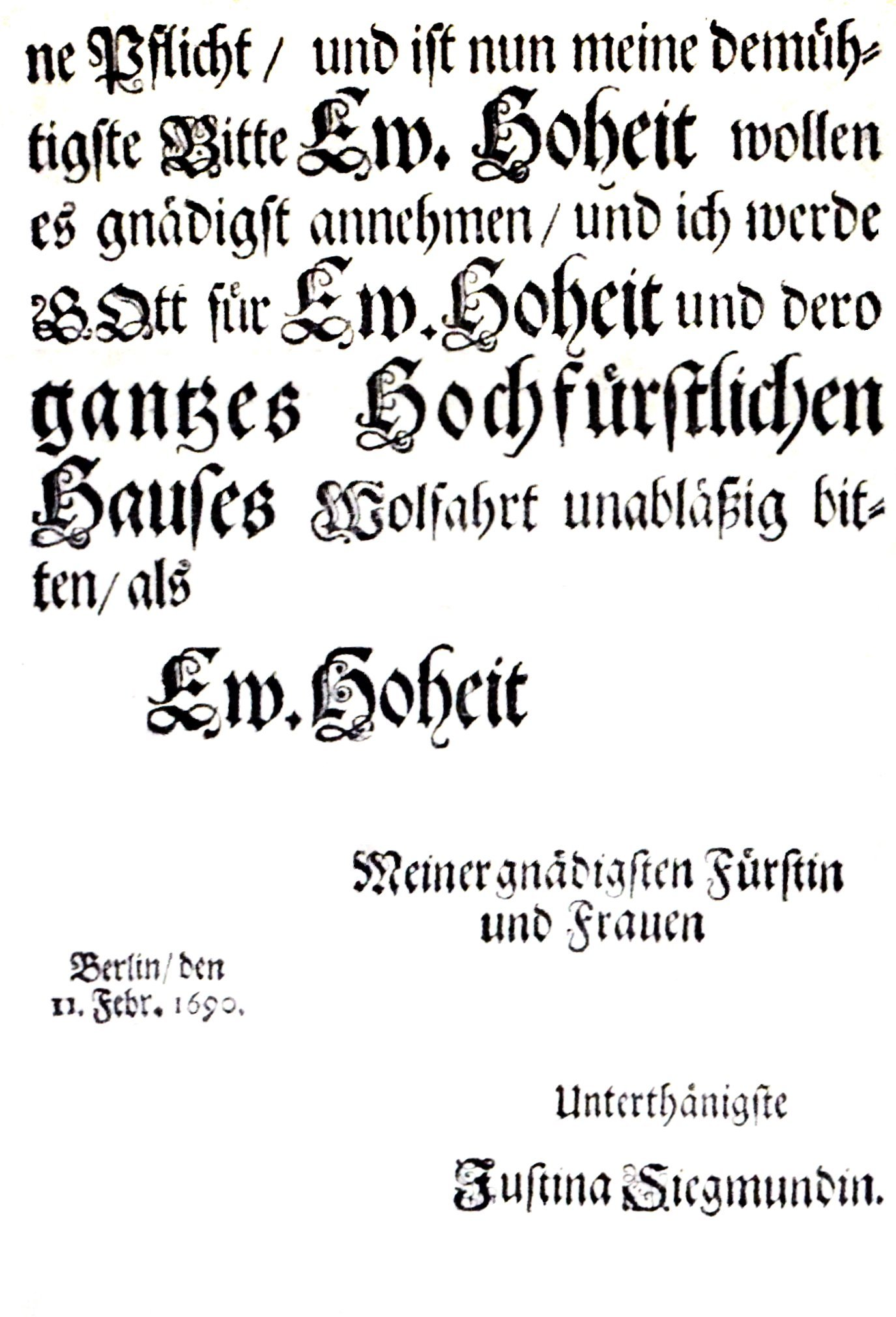 Justina Siegmundin - strona książki z nazwiskiem